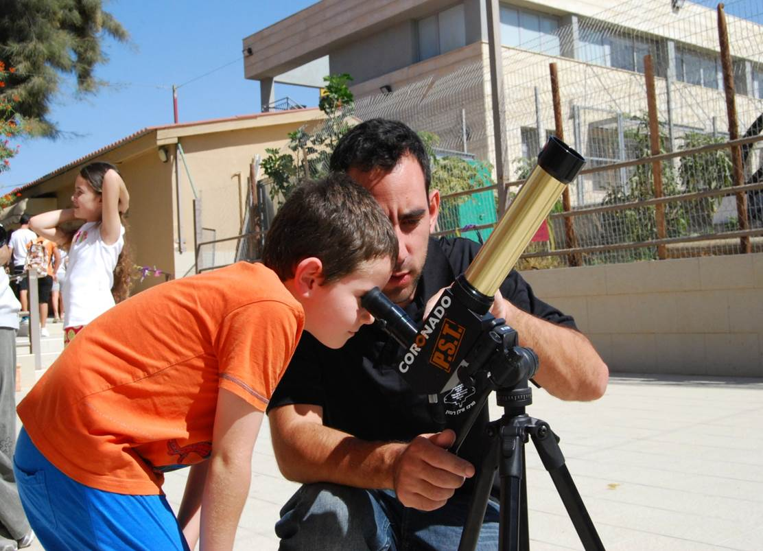 חלק מפעילות מדעדודס בגנים וחשיפה לאסטרונומיה לילדי כיתות א'-ו, תכניות בית יציב'